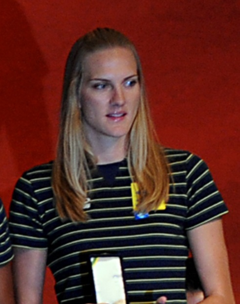 A jogadora de voleibol Mari na 3ª Conferência Nacional do Esporte.